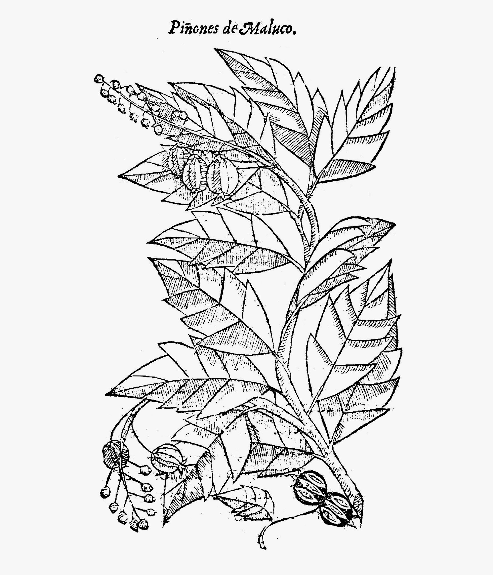 Abbuldung von Croton tiglium